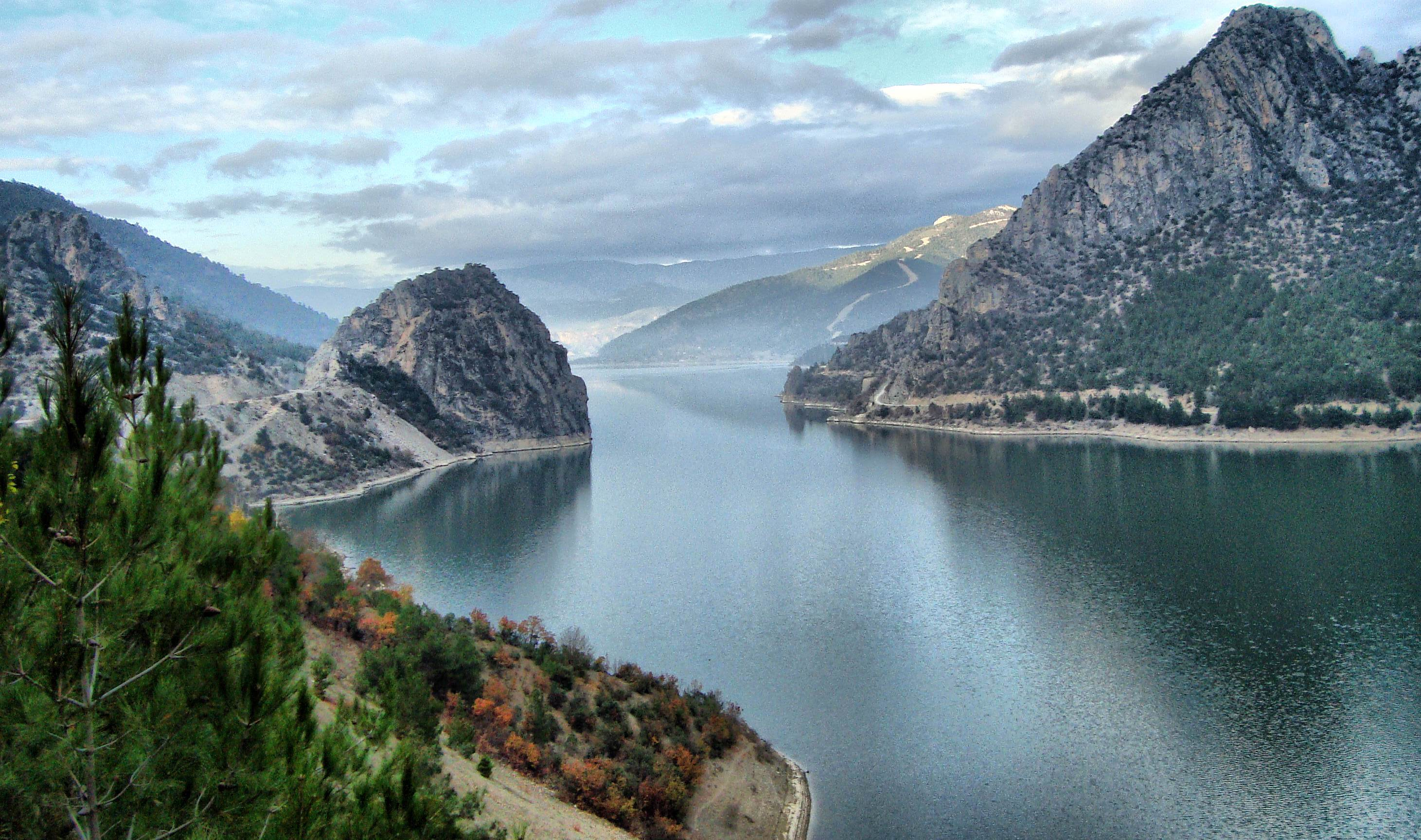 Altınkaya dam.